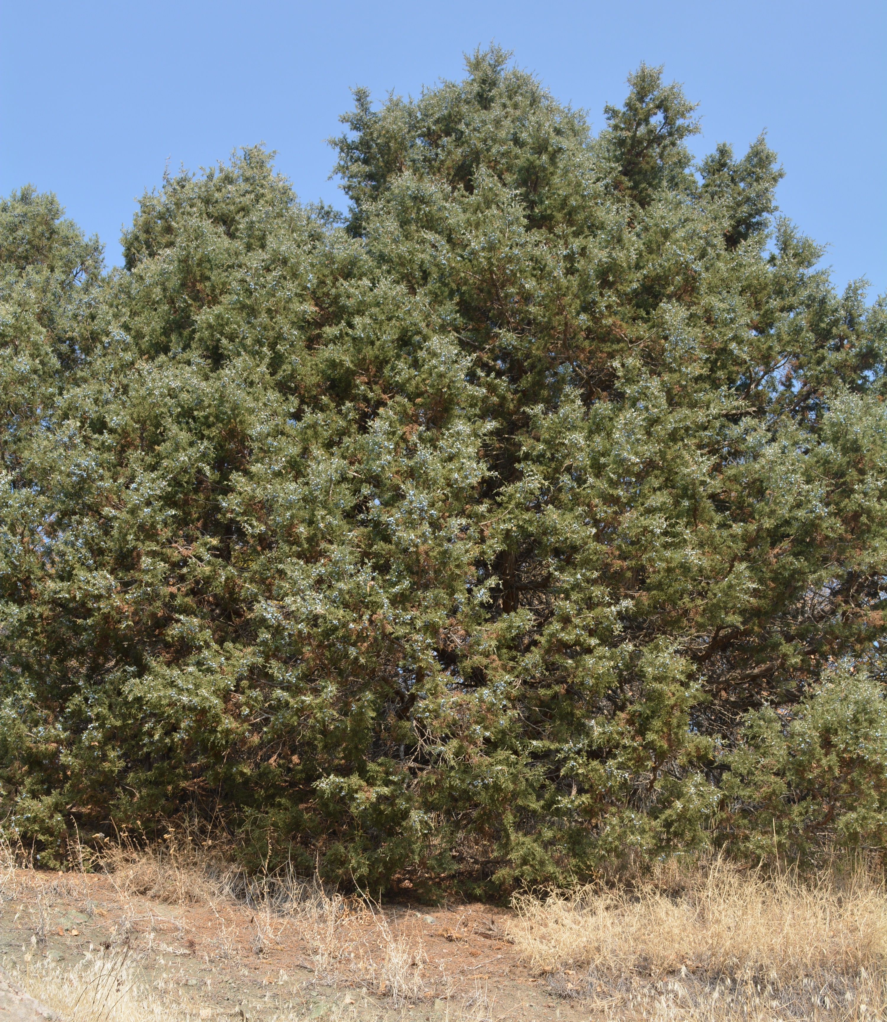 Խոսրով